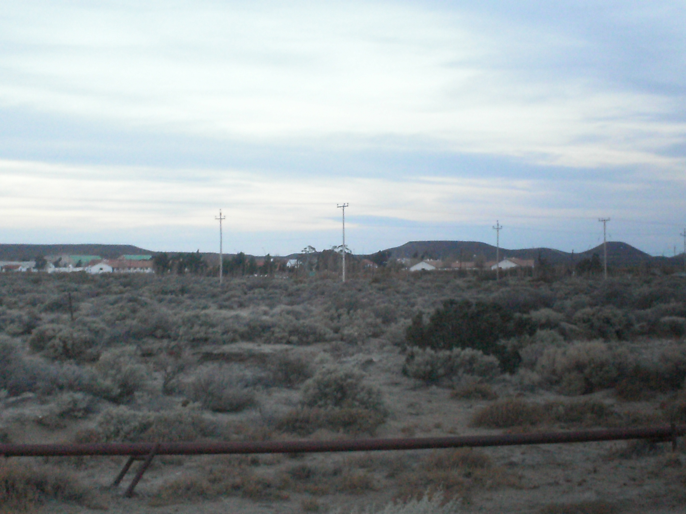 las viviendas de los militares en km 11, parte de comodoro